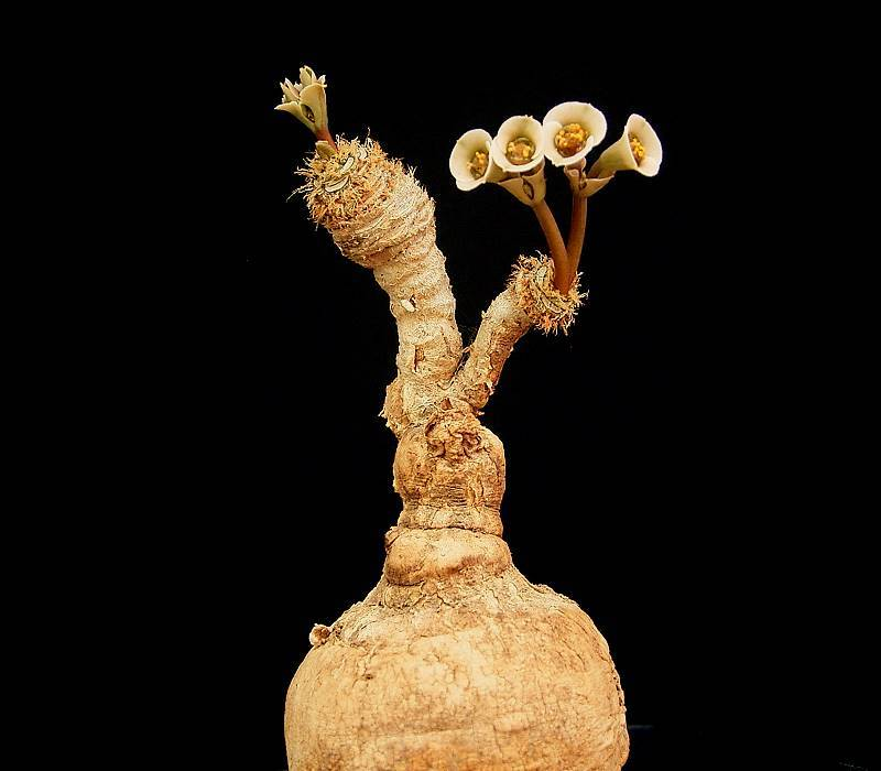 Euphorbia primulifolia